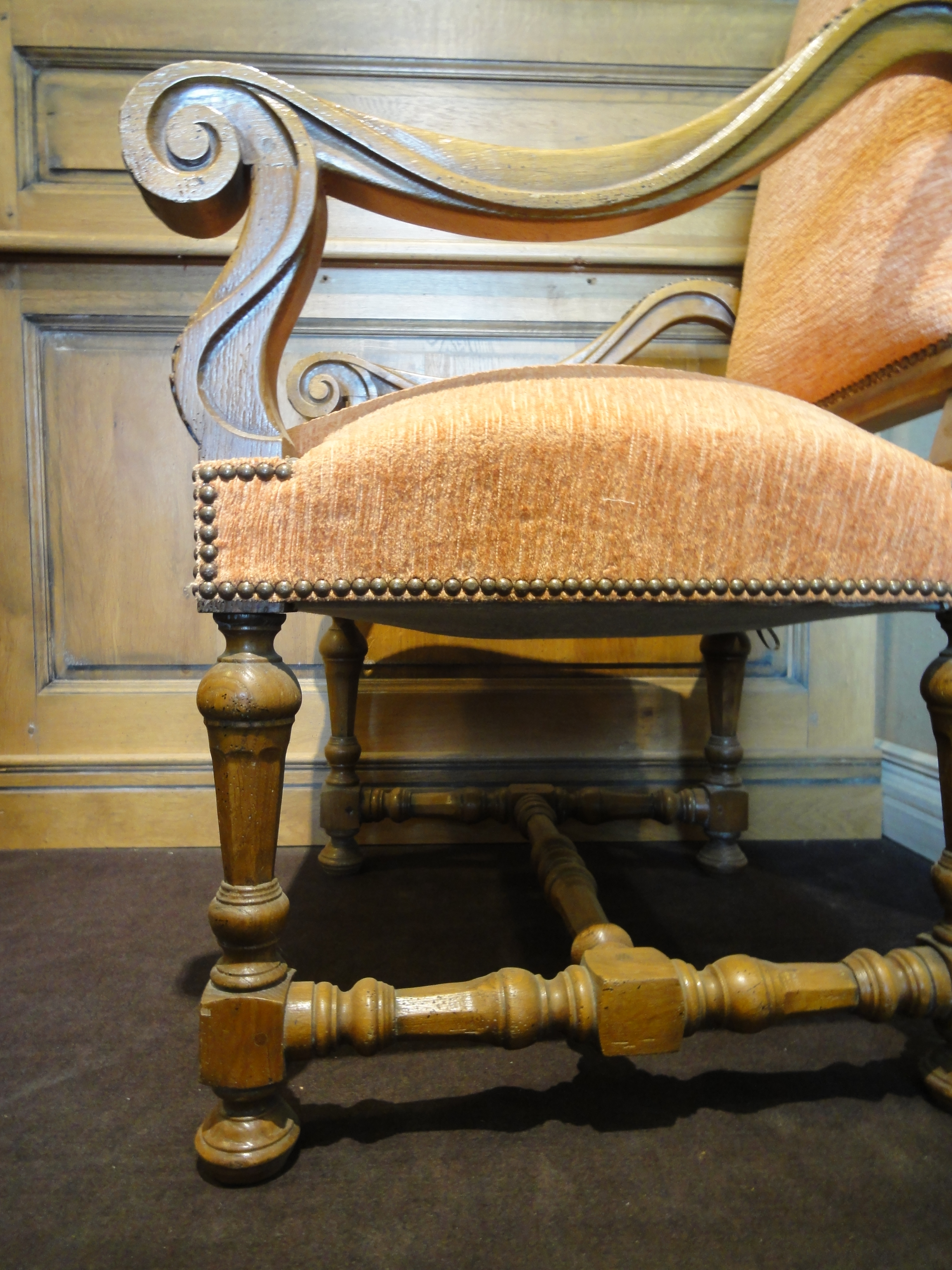 Style Louis XIII, réalisé par les Ateliers Allot Frères.